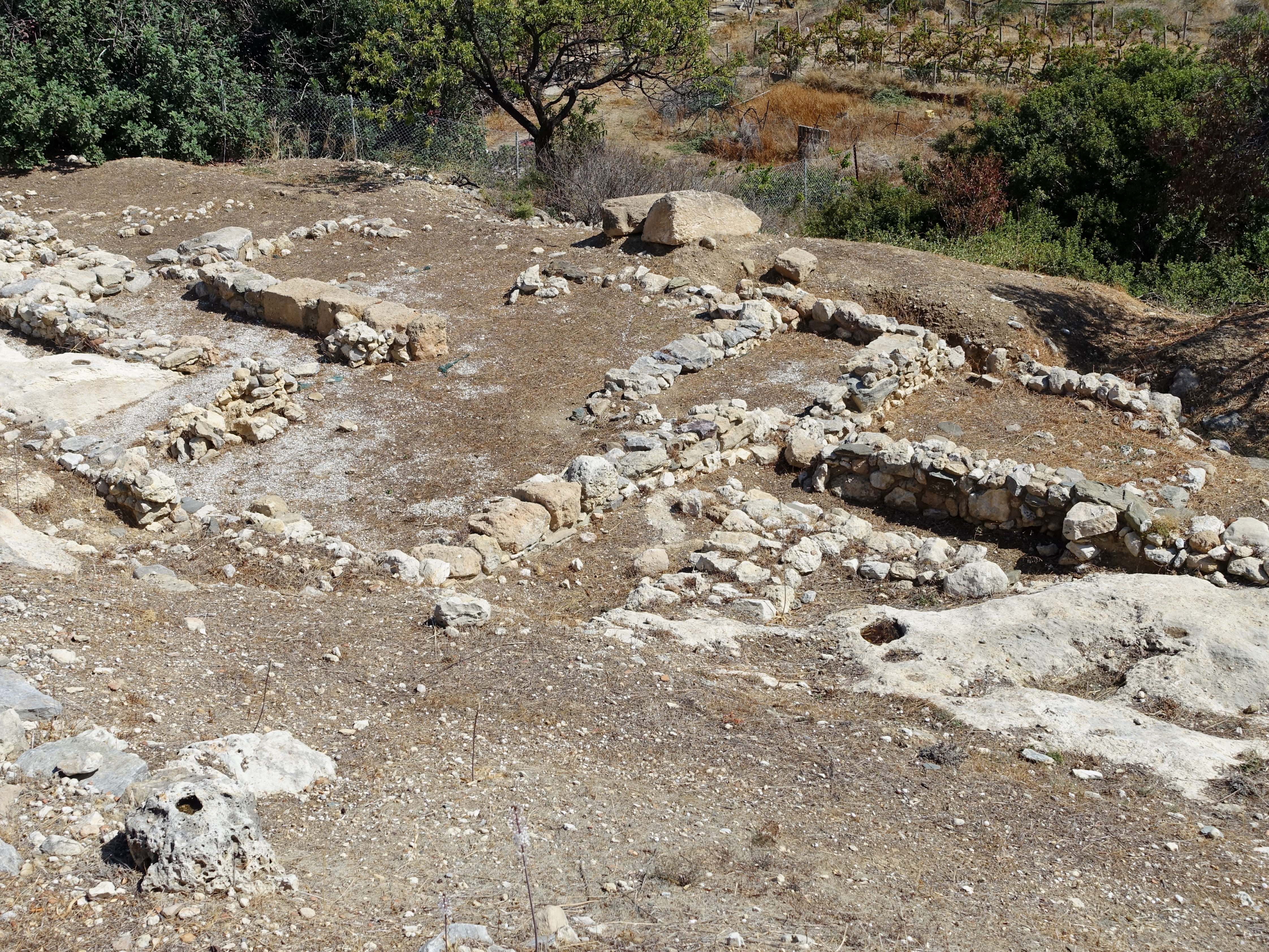 Minoische Ausgrabungsstätte von Petras (Πετράς), Gemeinde Sitia, Kreta, Griechenland